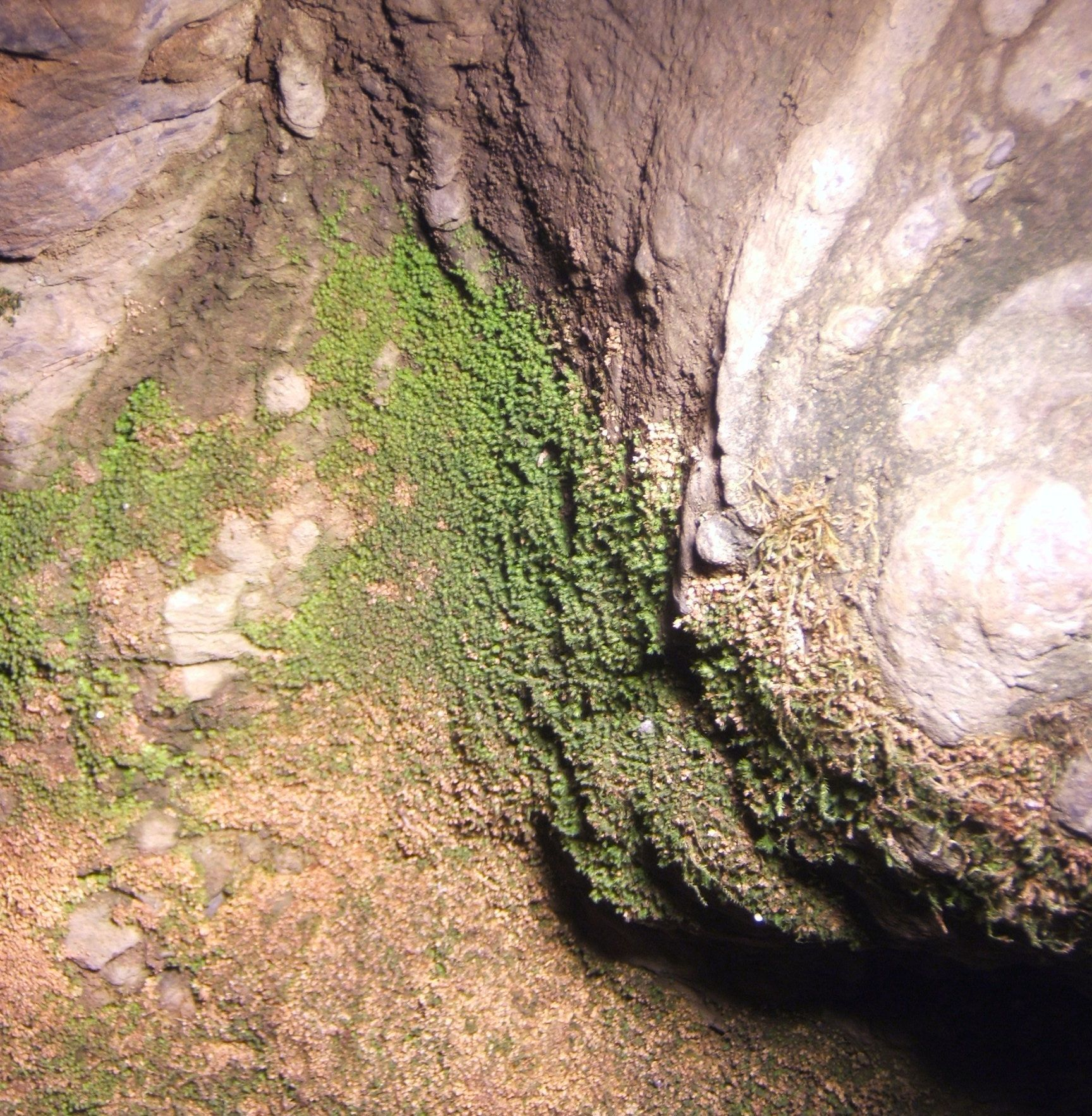 Unterirdische Vegetation in der Aggertalhöhle, Ründeroth (Engelskirchen)